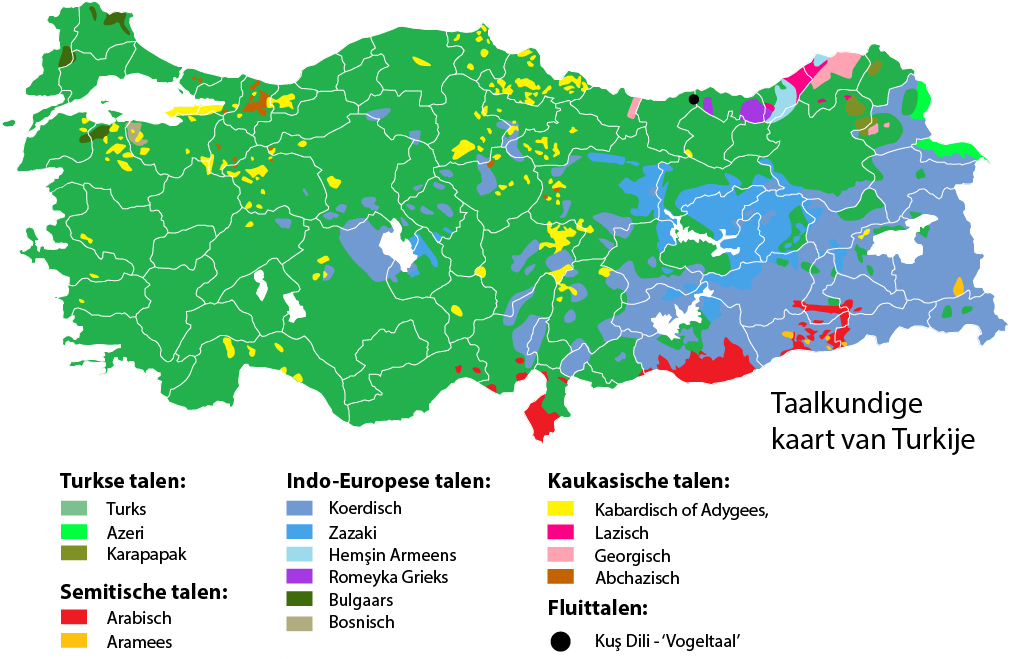 Taalkundige kaart van Turkije. Bewerking van een Duitse kaart van Sirwanii, met toevoeging van andere talen. Sources: Map of Caucasian languages in Turkey at Lingvarium, File:Türkiyeetnikharitası.JPG, File:Kurdish settlement.jpg, File:DistributionOfAzerbaijanisInCaucasusAndME.png, Kurds of Central Anatolia.jpg, File:Arabs in turkey.gif, File:Zaza Map.gif, Linguistic map of Turkey and Cyprus by Mutuzirkin, Greek-speaking enclaves in Pontus today: The documentation and revitalization of Romeyka, Map of Hemsin villages by Hagop Hachikian